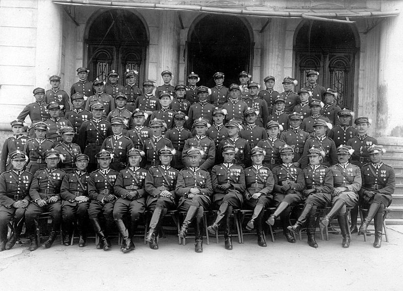 Zdjęcie grupowe podoficerów i oficerów 2 Pułku Strzelców Podhalańskich przed Domem Żołnierza w Sanoku w 1931. Wśród nich dowódca pułku płk Janusz Wacław Dłużniakiewicz. Siedzą w I rzędzie od lewej: 1) por. Rudolf Belina, 2) por. Edward Antoni Kantor, 4) kpt. Tadeusz Jan Ochęduszko, 6) mjr Stanisław Stahlberger, 7) płk Janusz Wacław Sęp-Dłużniakiewicz – dca 2 psp, 11) por. Franciszek Pustelniak, 13) por. Edward Solon; II rząd od prawej: 2) ppor. Tadeusz Ciałowicz, 3) ppor. Józef Alfred Lubowiecki, 5) ppor. Jan Bolesław Trzeszczkowski, 6) por. Franciszek Pieniak, 8) ppor. Aleksander Florkowski.